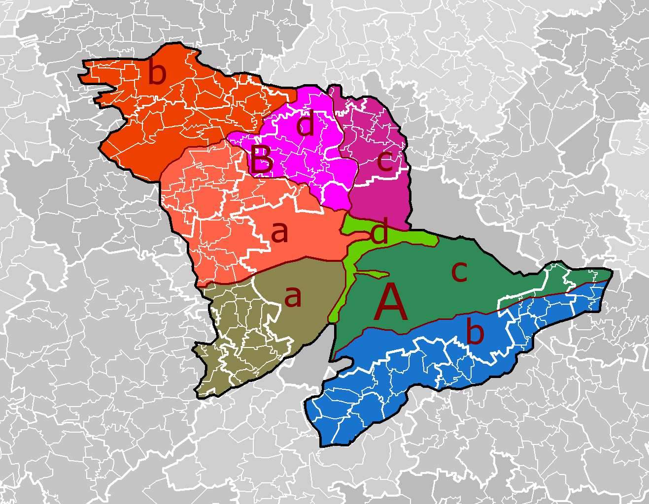 Poloha a členění geomorfologického celku Pražská plošina na podkladové mapě územněsprávního členění okolí Prahy. Hercynský systém Hercynská pohoří I Česká vysočina I5 (V) Poberounská subprovincie I5A (VA) Brdská oblast I5A-2 (VA2) Pražská plošina I5A-2-A (VA2-A) Říčanská plošina I5A-2-A-a (VA2-A-a) Třebotovská plošina I5A-2-A-b (VA2-A-b) Uhříněveská plošina I5A-2-A-c (VA2-A-c) Úvalská plošina I5A-2-A-d (VA2-A-d) Pražská kotlina I5A-2-B (VA2-B) Kladenská tabule I5A-2-B-a (VA2-B-a) Hostivická tabule I5A-2-B-b (VA2-B-b) Slánská tabule I5A-2-B-c (VA2-B-c) Zdibská plošina I5A-2-B-d (VA2-B-d) Turská tabule